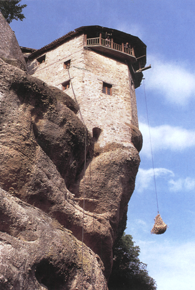 Монастир Святого Варлаама - сцена Розп'яття